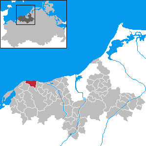 Kühlungsborn in Mecklenburg-Western Pomerania - District Bad Doberan